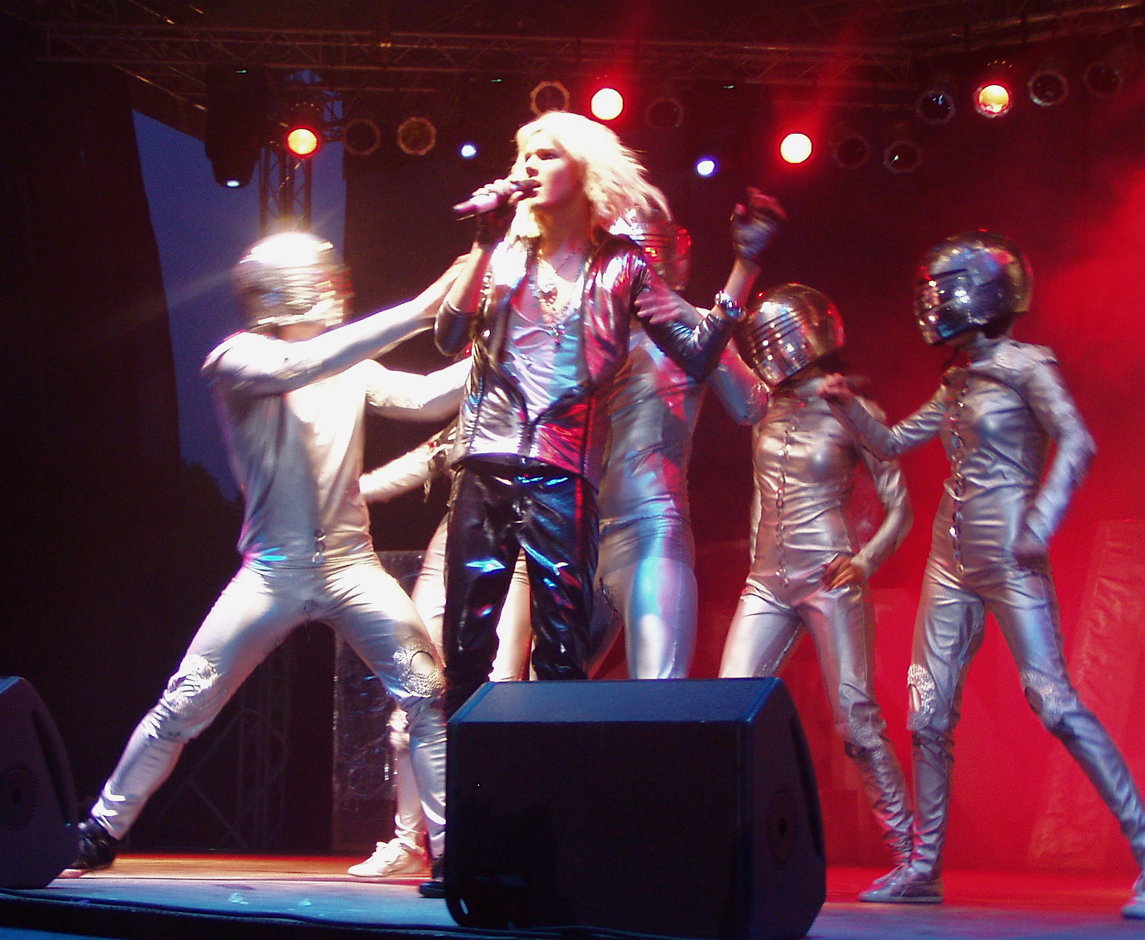 Виступ Б. Апрєля в Ізмаїлі під час туру "Фабрика в твоєму місті".